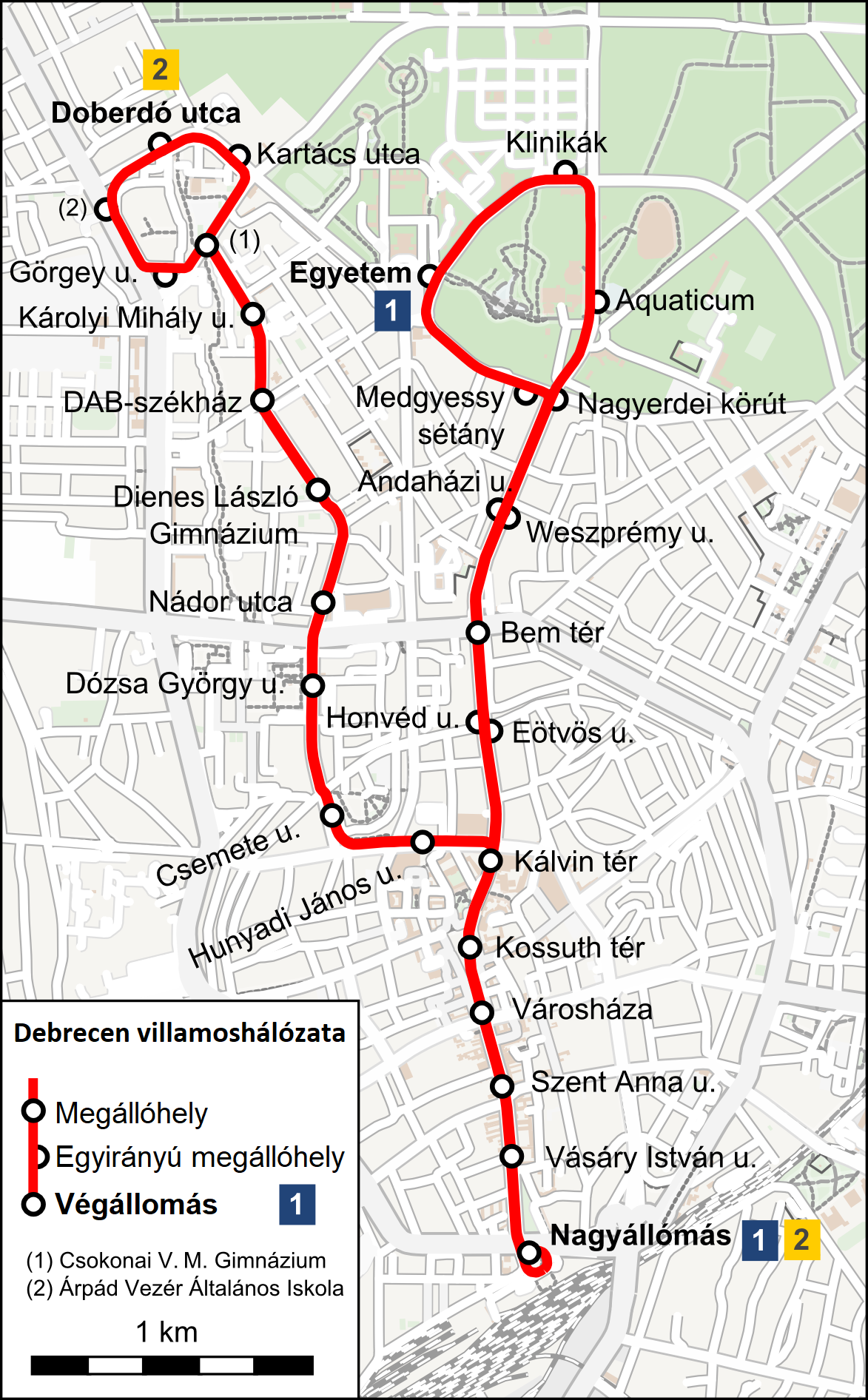 Debrecen villamoshálózata This map may be incomplete, and may contain errors. Don't rely solely on it for navigation.